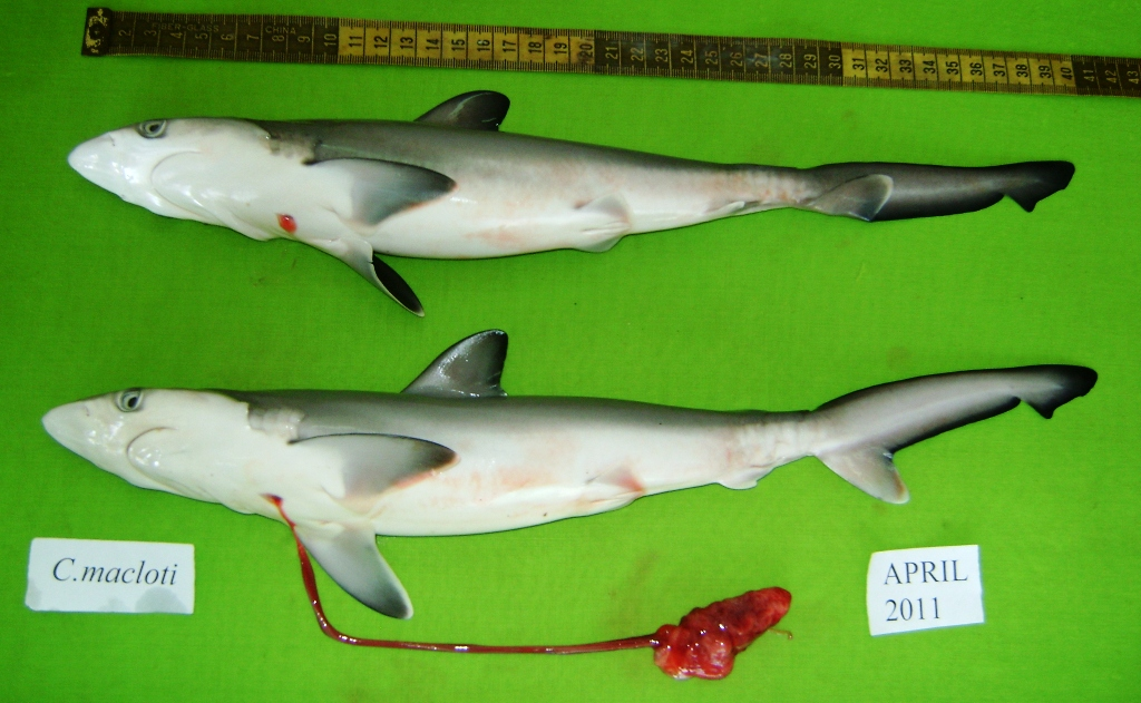 Newborns Carcharhinus macloti Karachi